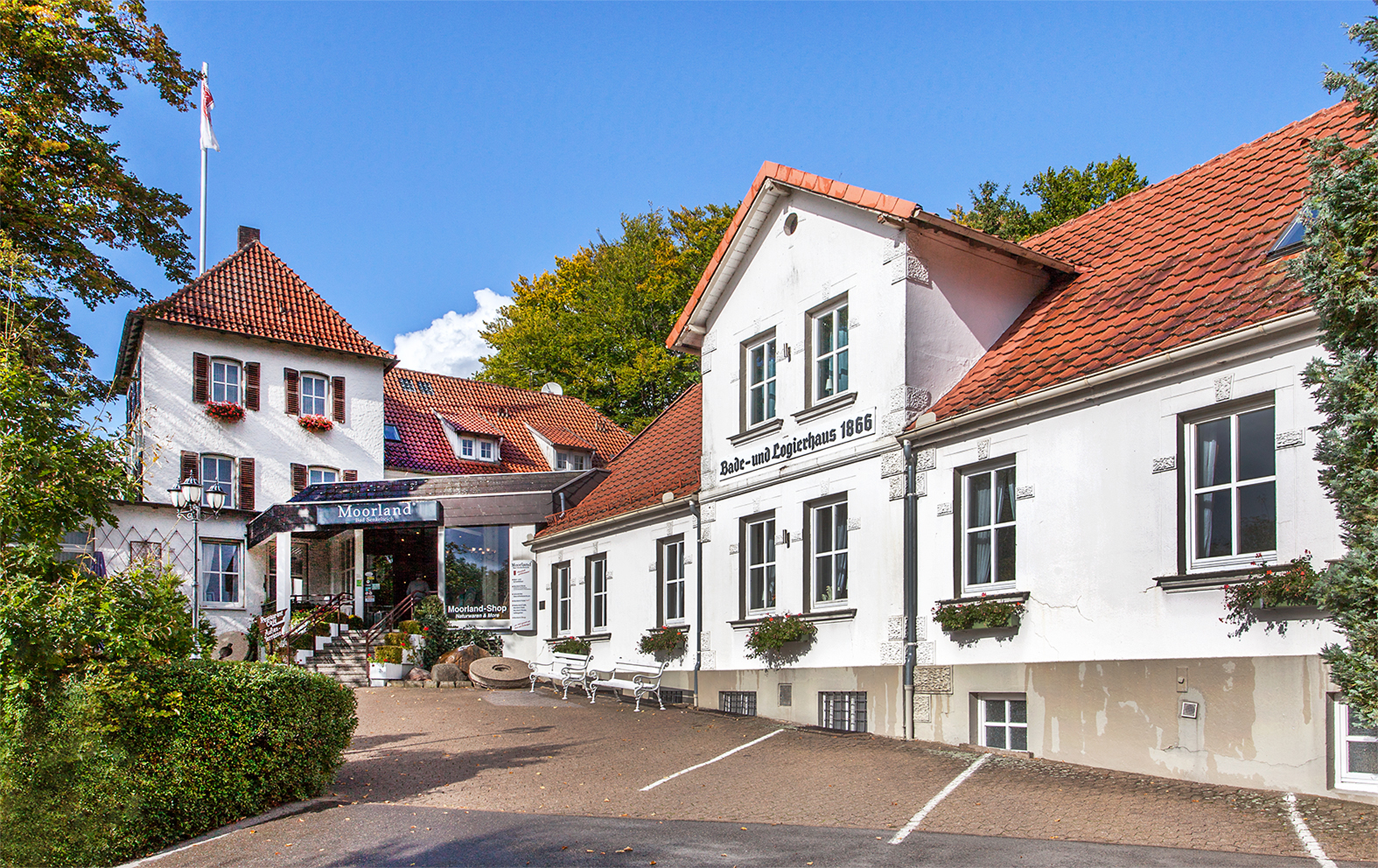 Moorland-Klinik in Bad Senkelteich (Vlotho-Valdorf), Kreis Herford